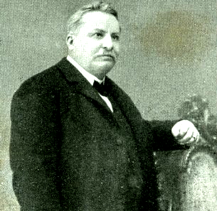 Il poeta italiano Giovanni Pascoli